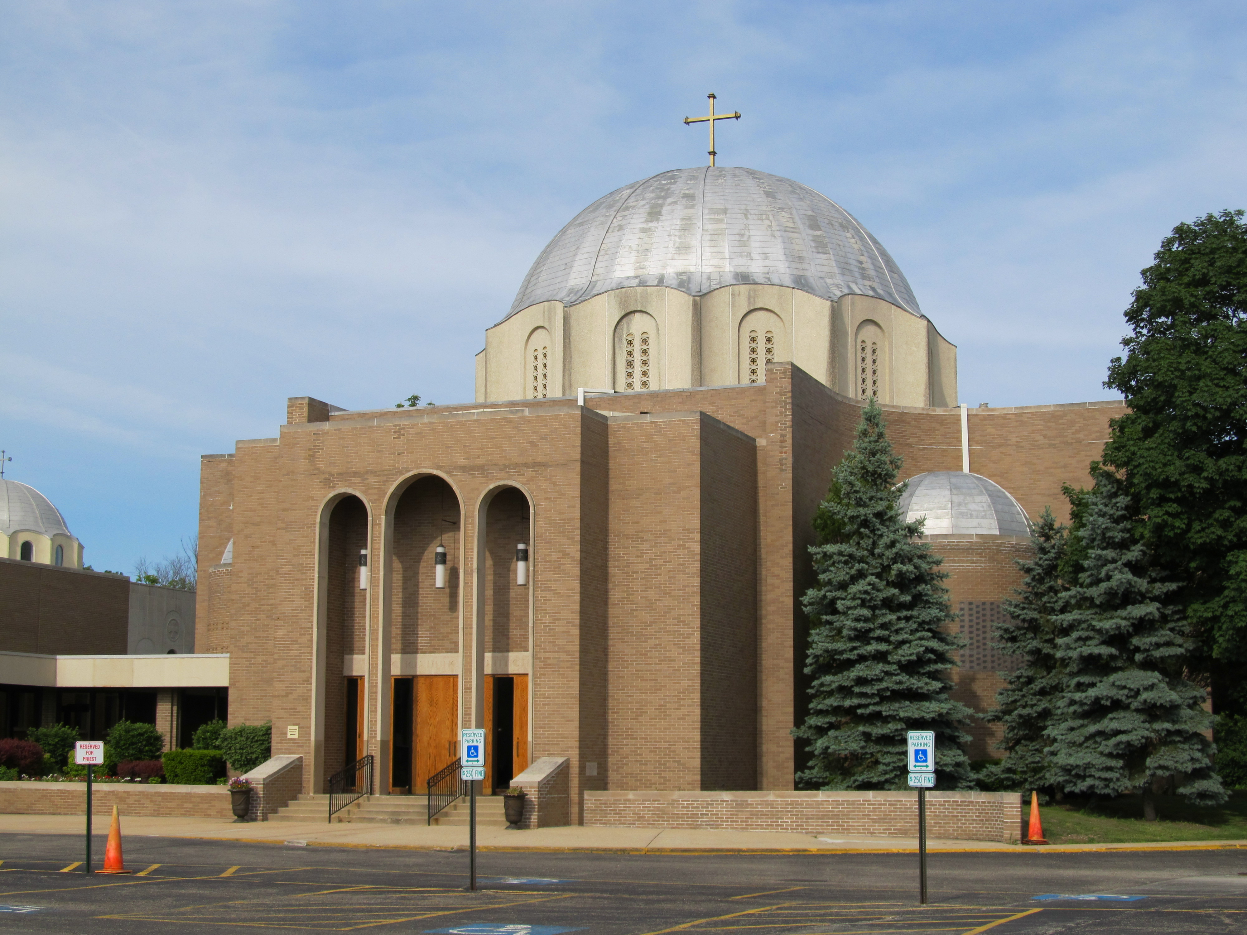 2350 Dempster St Des Plaines, IL 60016